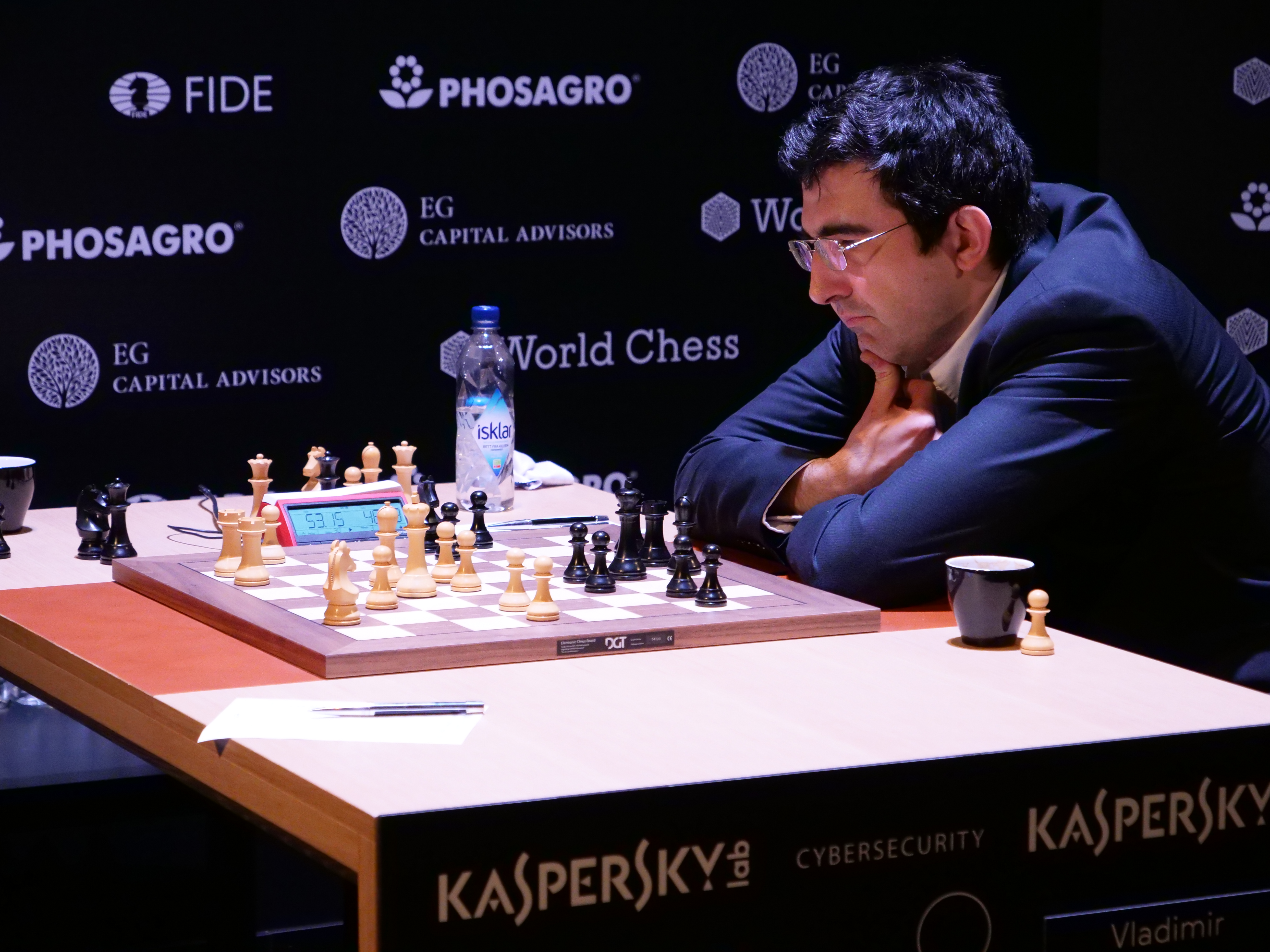 Kramnik-Məmmədyarov-Kandidatenturnier Berlin 2018 Runde 6